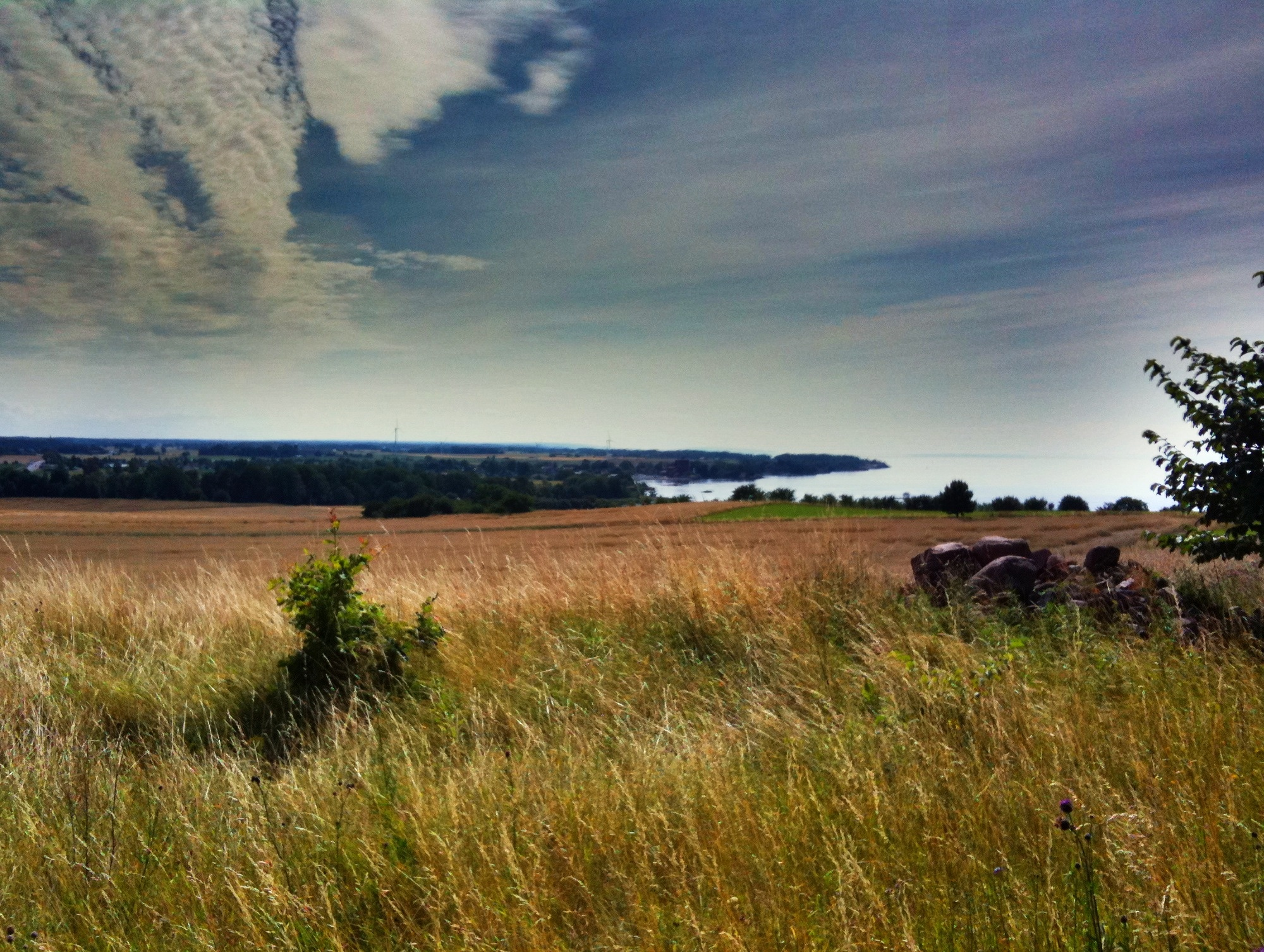 Från nedre delen av Omberg.